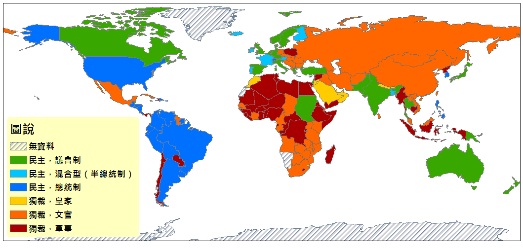 世界各政體的分類，民主的再細分成：议会制、混合型（半总统制）、总统制；独裁的再細分成：皇家、国家非军事、军事。 引用來源：Cheibub, José Antonio, Jennifer Gandhi, and James Raymond Vreeland. 2010. “Democracy and Dictatorship Revisited.” Public Choice, vol. 143, no. 2-1, pp. 67-101. 原資料集包括202國家從1946或該國政體獨立的年開始到2008年 此圖僅呈現1988年資料，由zh:User:hanteng繪製